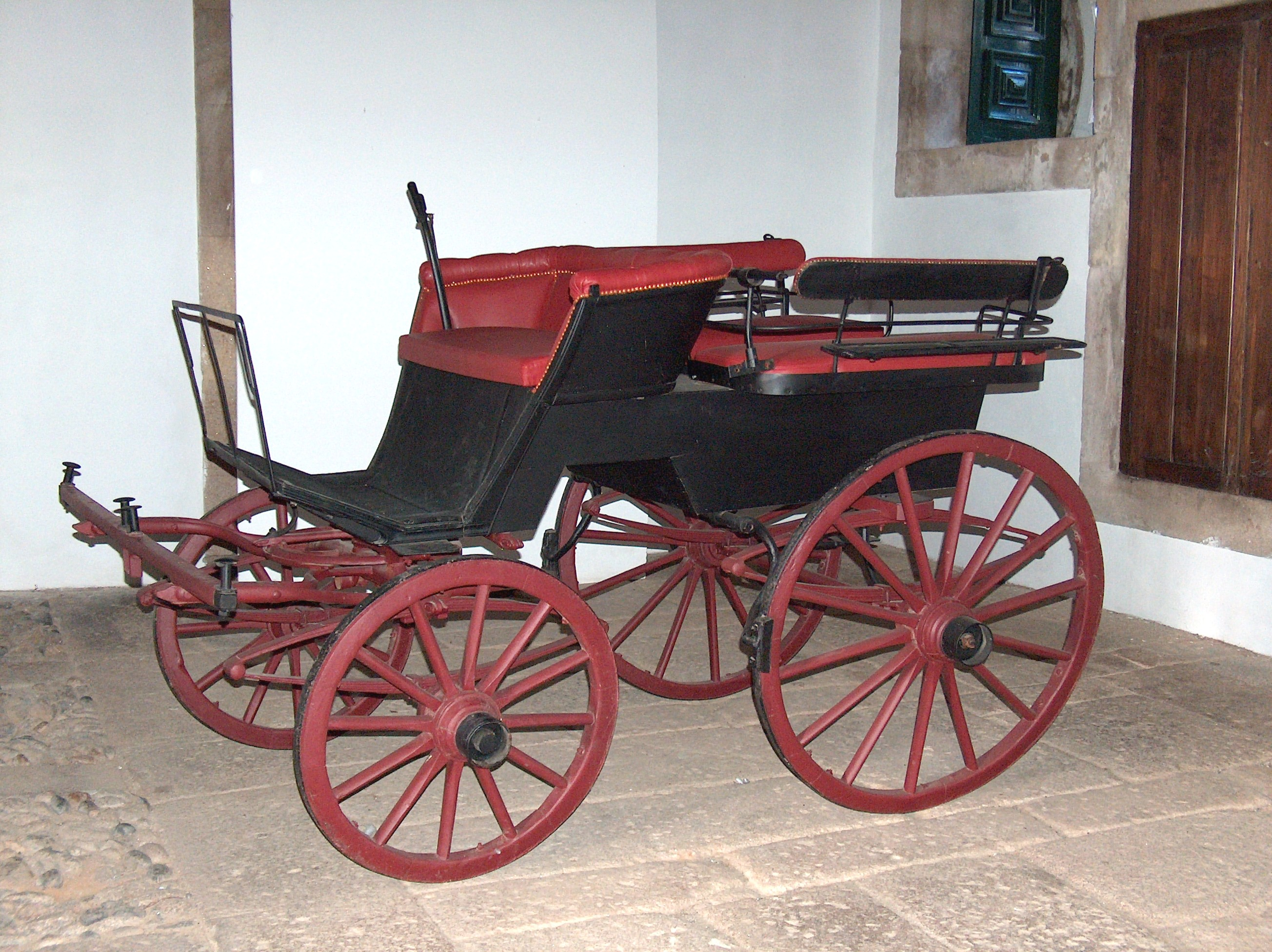 Descrição Palácio de Mateus freguesia de Mateus, concelho de Vila Real, Distrito de Vila Real, Portugal. Fonte Carregada pelo autor Autor João Carvalho